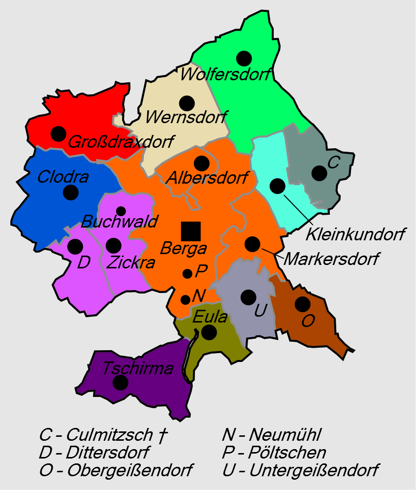 Gliederung der Stadt Berga/Elster ab 1. Juli 1958